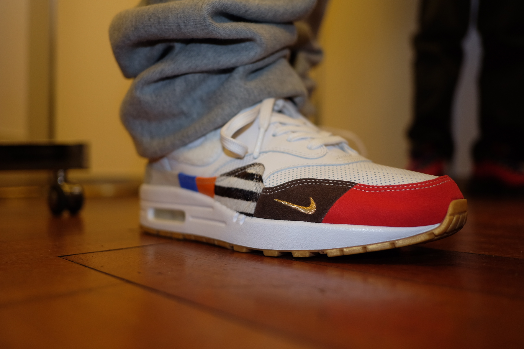 東京のMASTER OF AIRが所有するエアマックス1"MASTER"